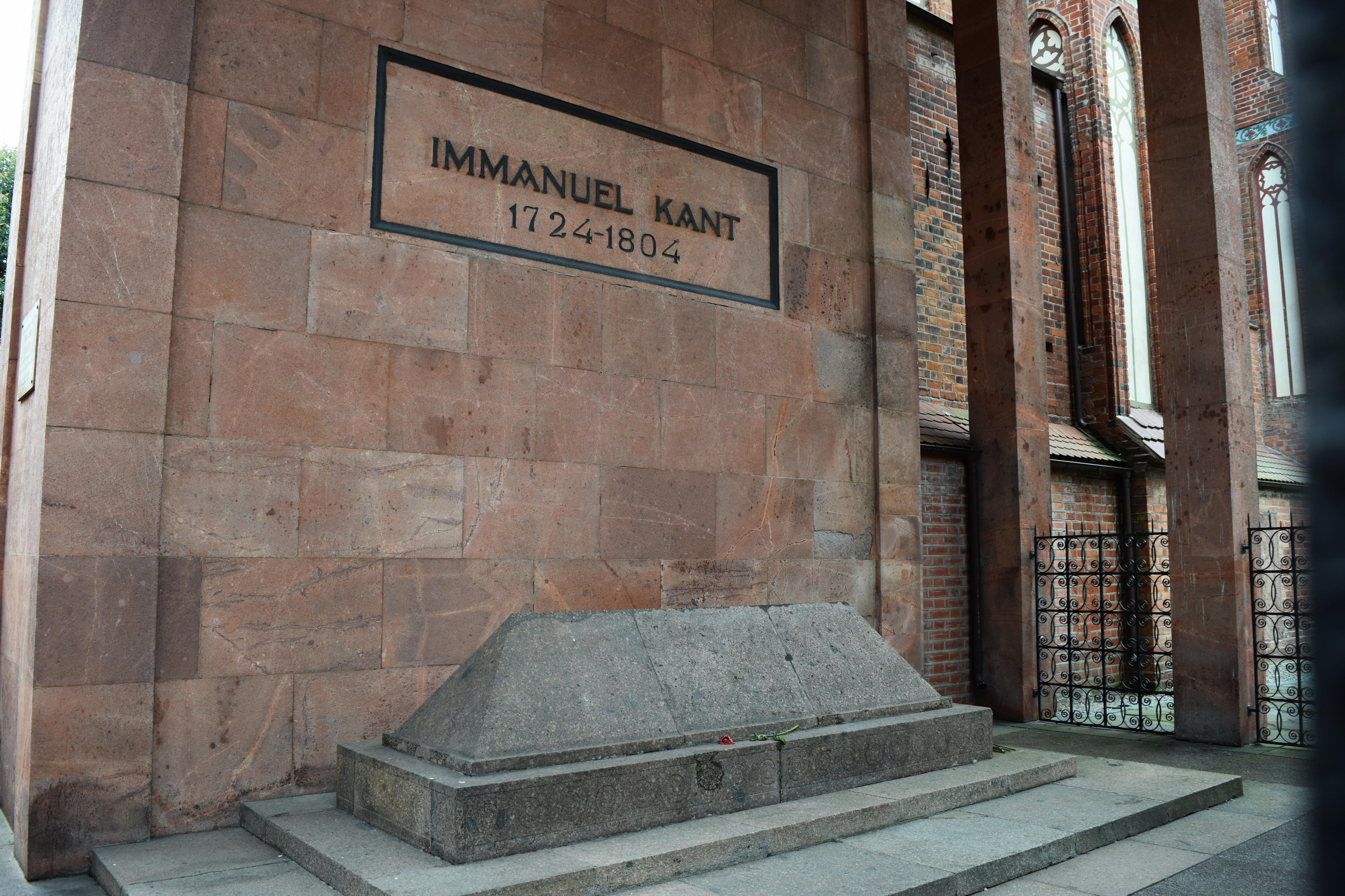 Moskovskiy rayon, Kaliningrad, Kaliningradskaya oblast', Russia